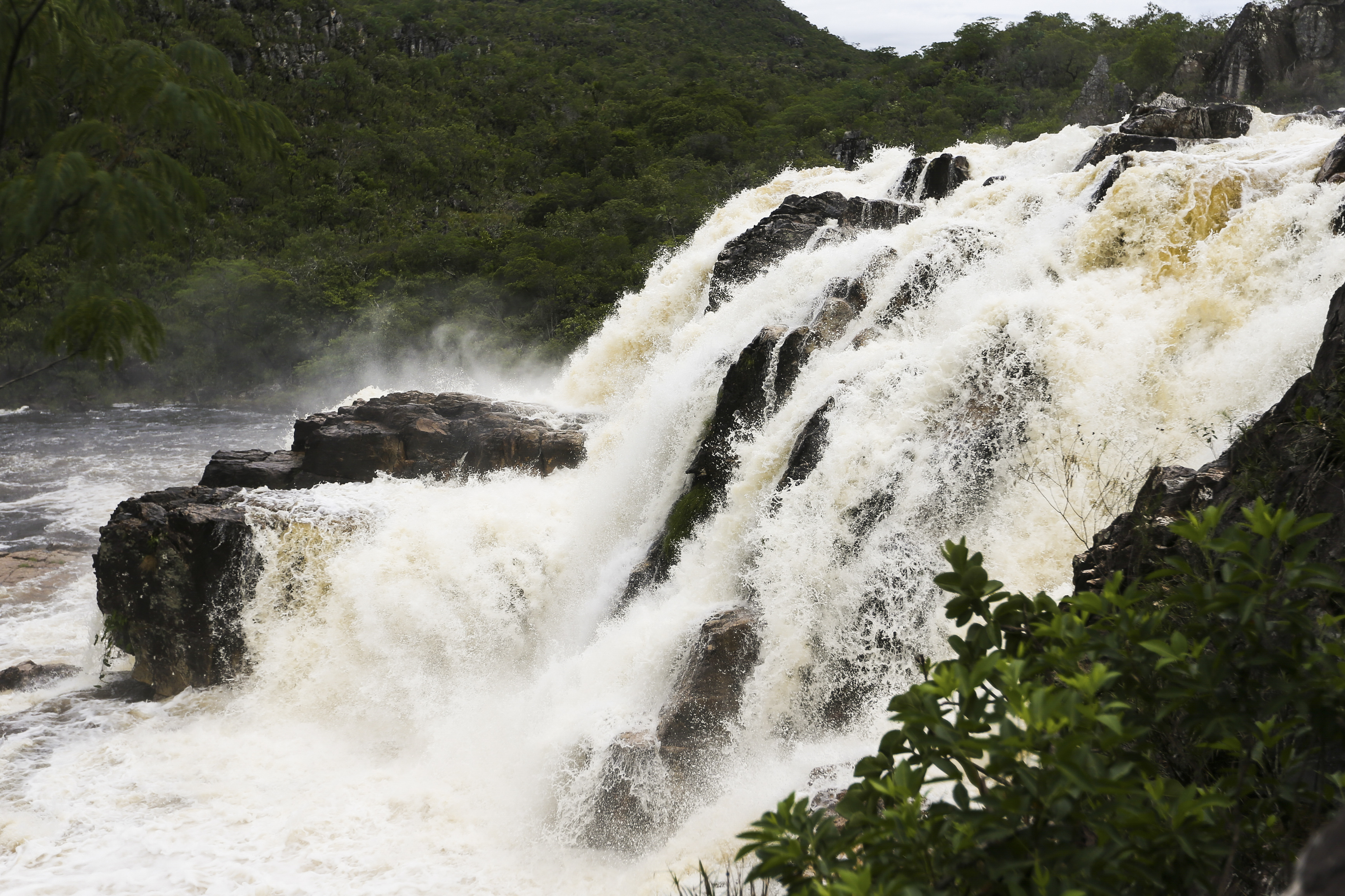 Alto Paraíso (GO) - Cachoeira conhecida como Cariocas, no Parque Nacional da Chapada dos Veadeiros.